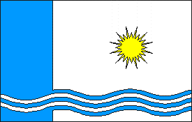 Флаг посёлка Высу